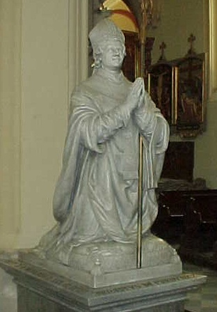 Kenotaph in der Glatzer Pfarrkirche, der Prager Erzbischof Ernst von Pardubitz